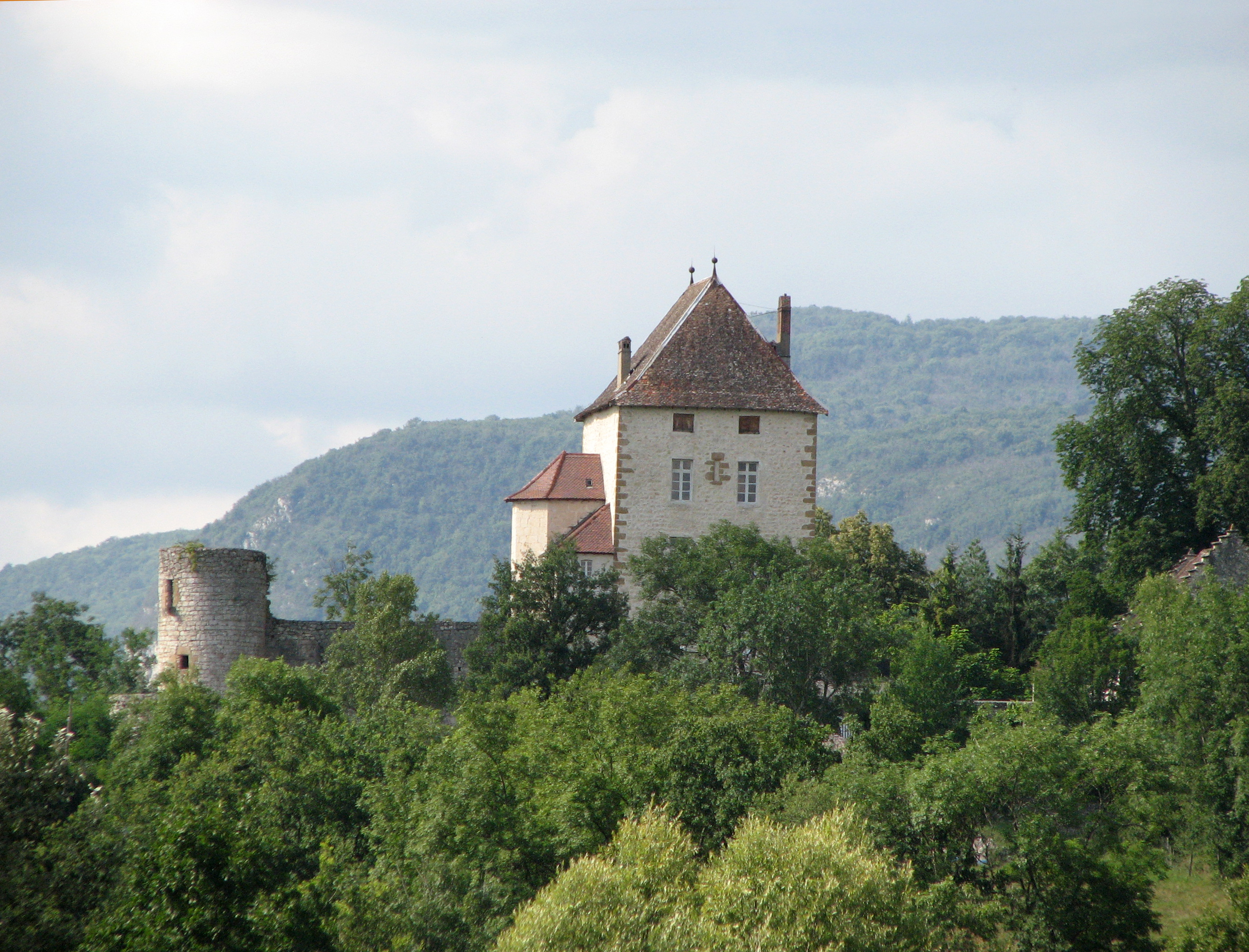 Château de la Barre à Brégnier-Cordon